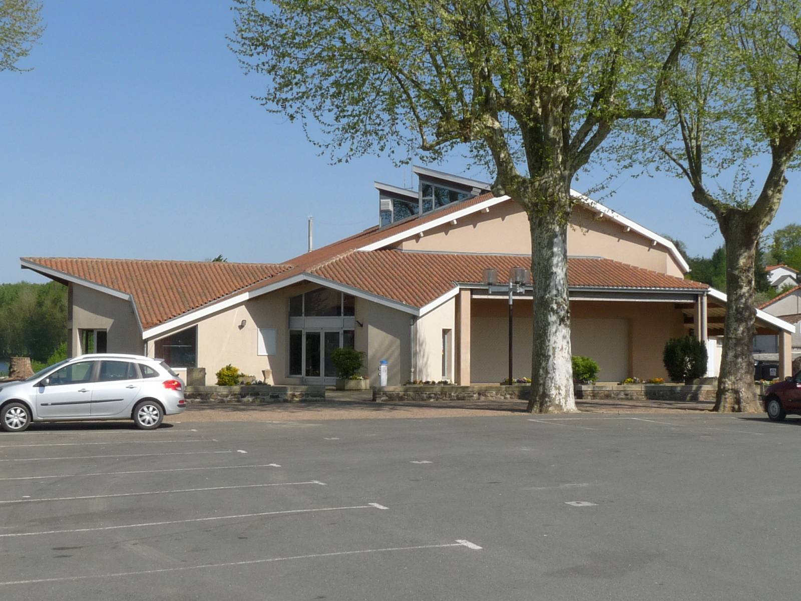 Marché couvert, Chabanais, France